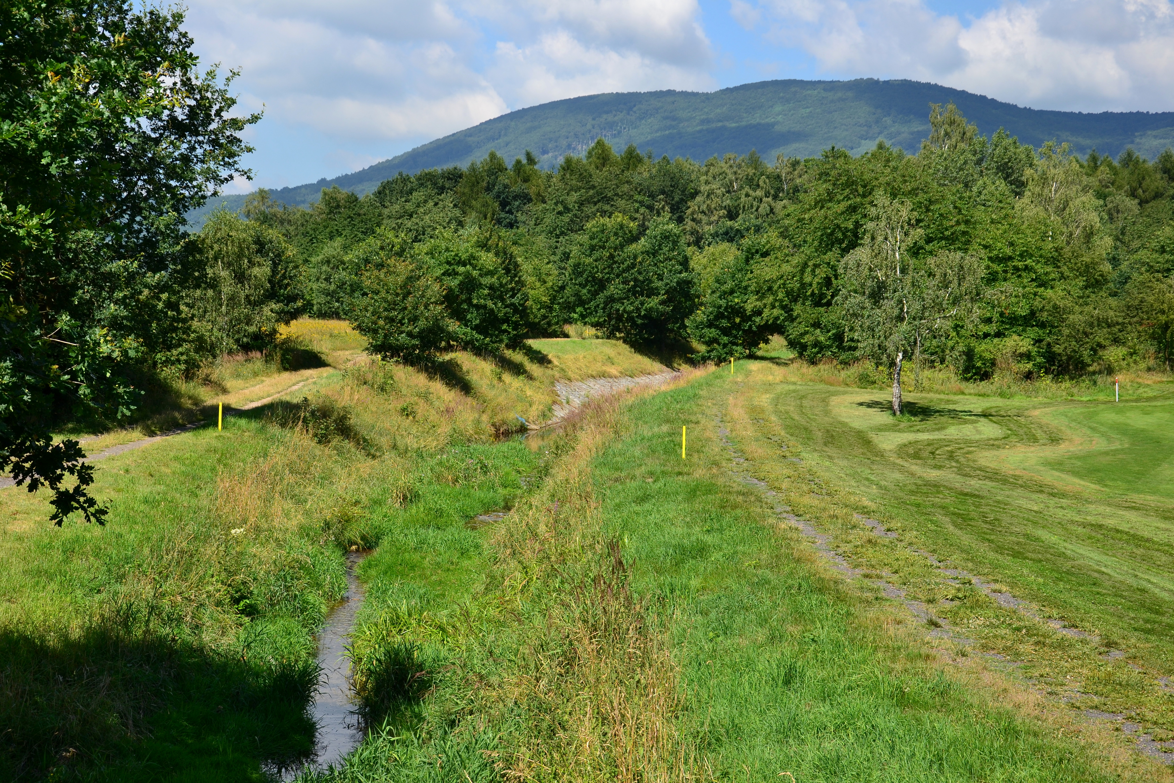 Bouřlivec v golfovém hřišti u Jeníkova